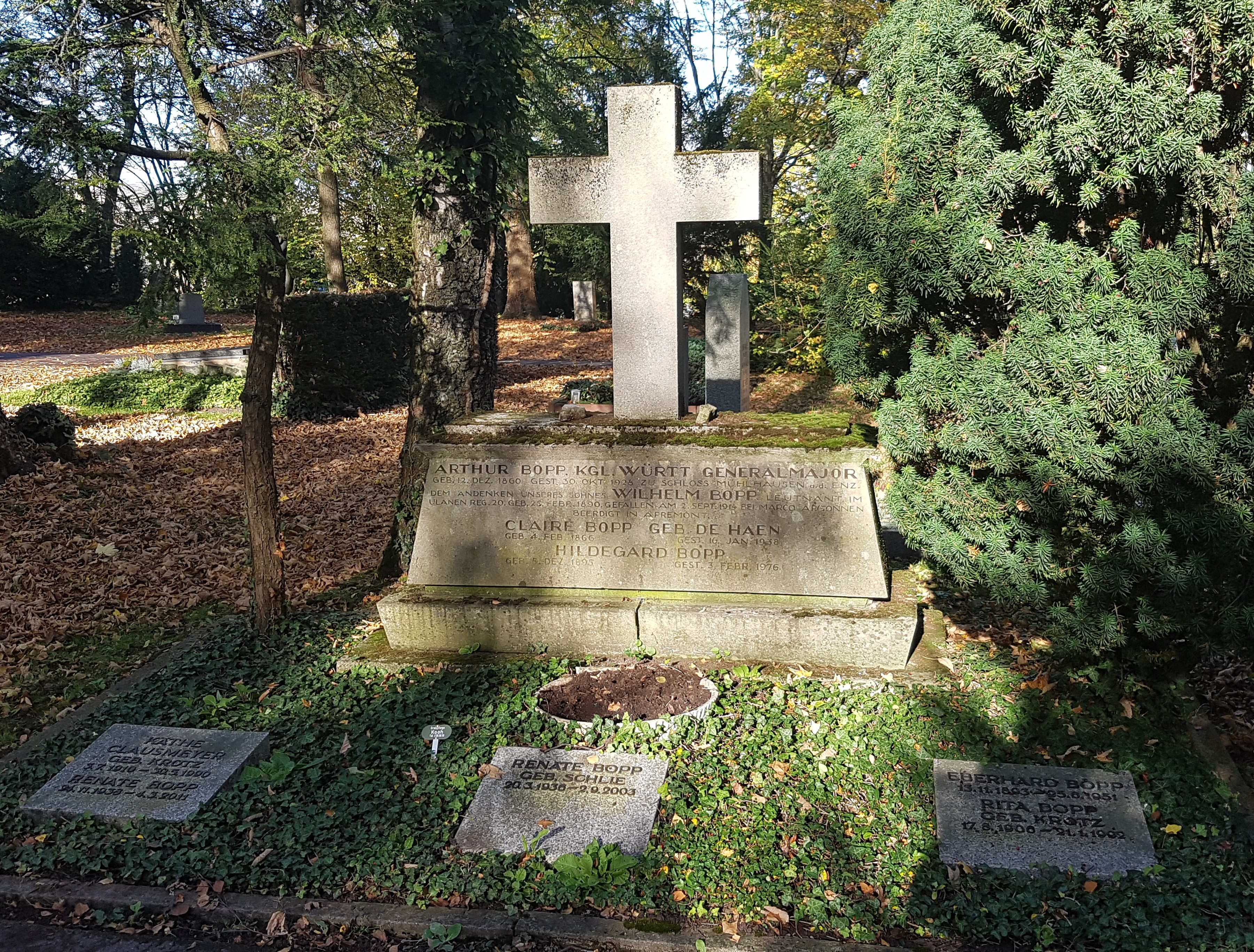 Grabmal des Generalmajors Arthur Bopp auf dem Pragfriedhof in Stuttgart